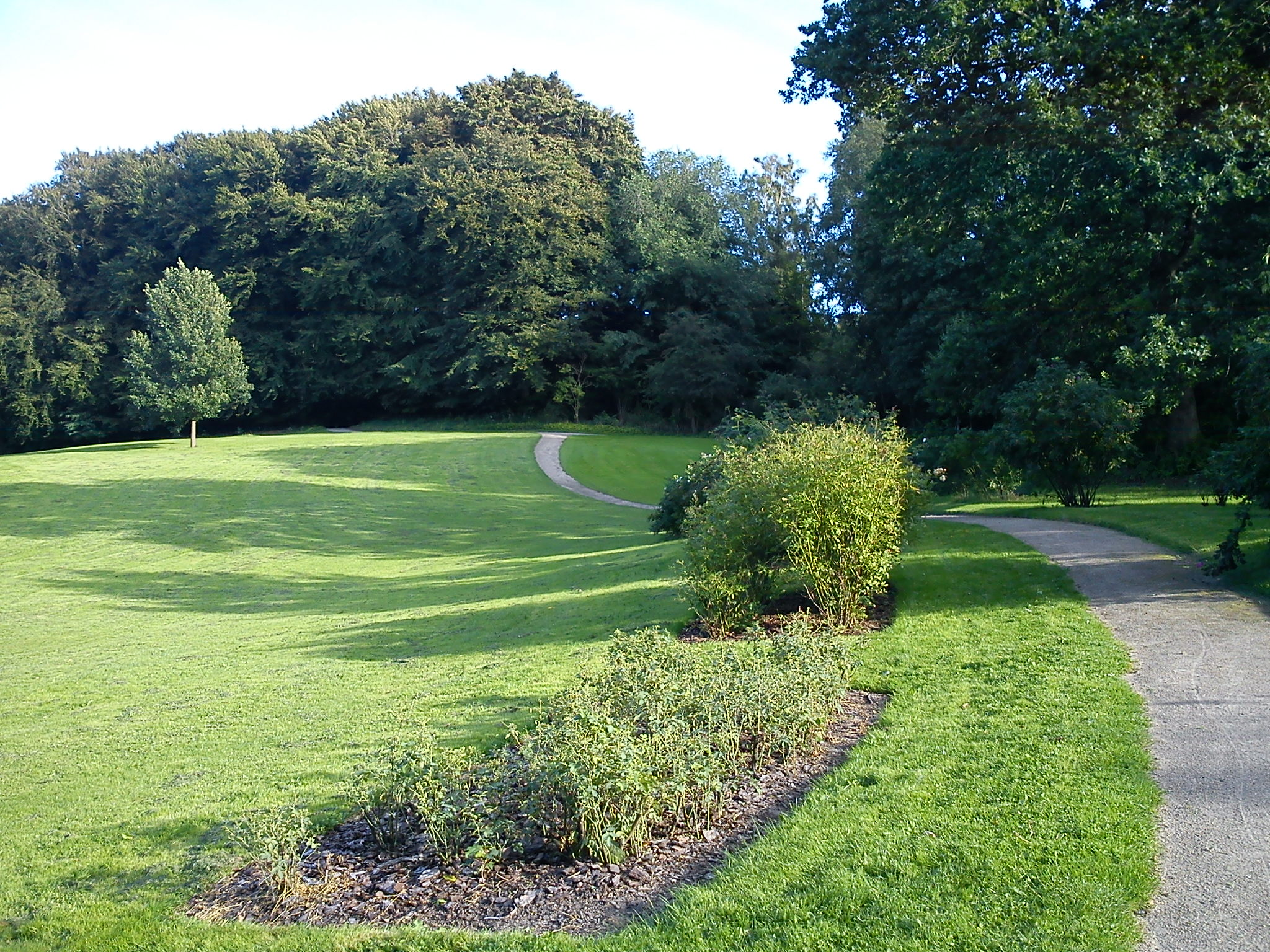 Slotsparken ved Marselisborg Slot